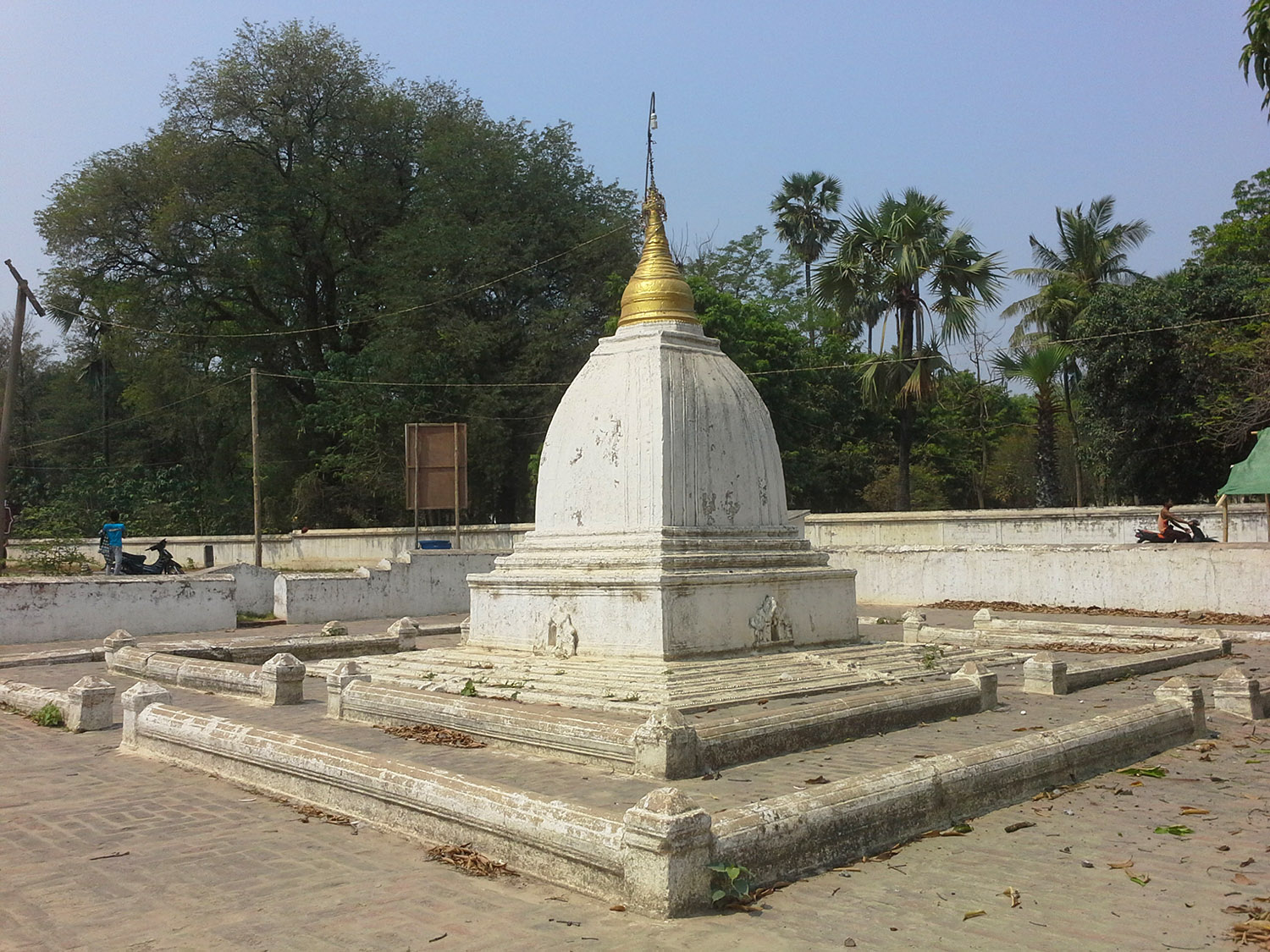 မြန်မာဘာသာ: မင်းကွန်းပုထိုးတော်ကြီး၏ နမူနာပုံစံ ၁၅ ပေခန့် အမြင့်ရှိသည့် ပုံတော်ဘုရား